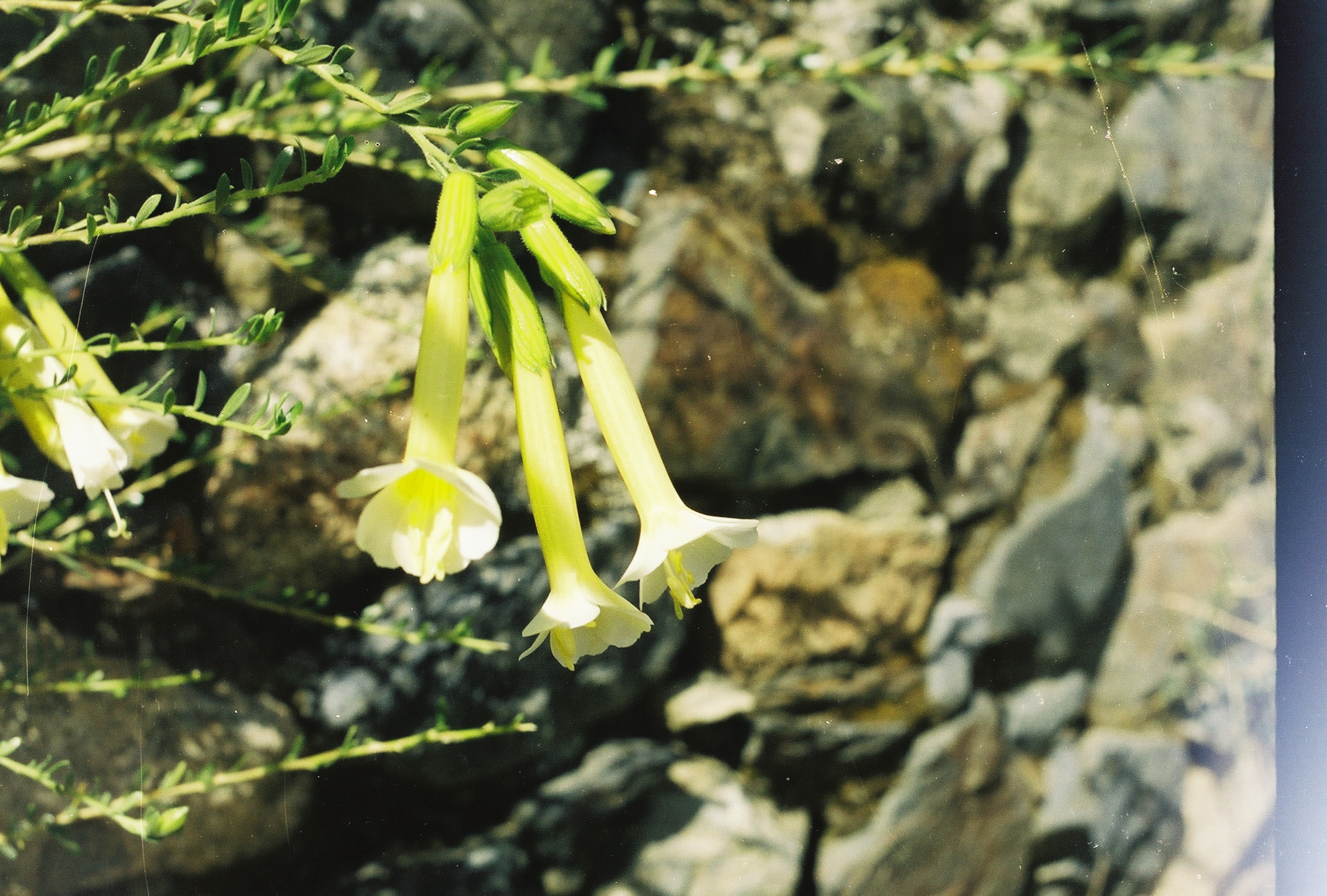 buschige Pflanze aus Peru, hier die weiße Variante. Ticllos 2002 von Uta Freund